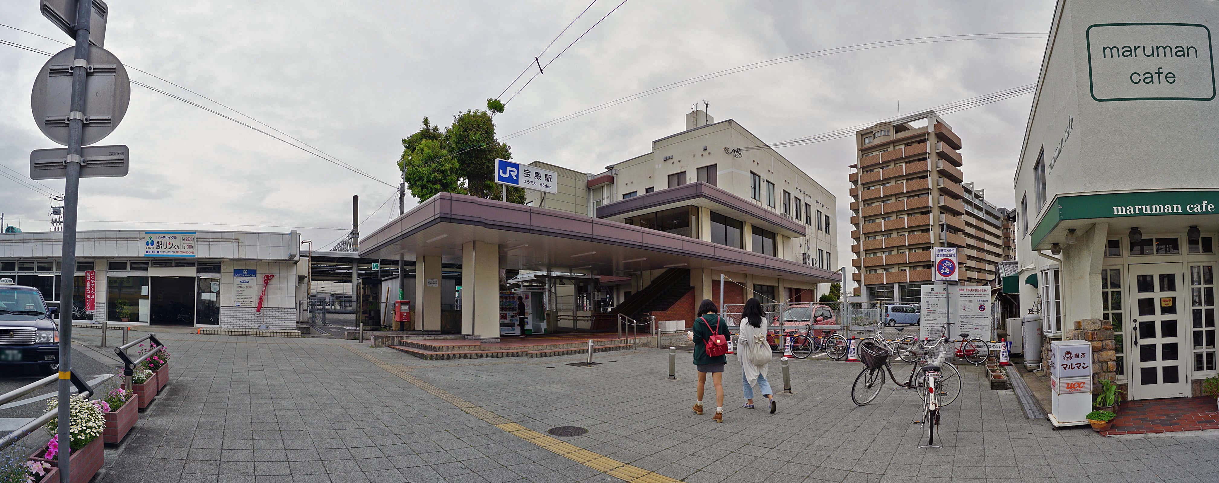 JR Hoden sta. , JR 宝殿駅